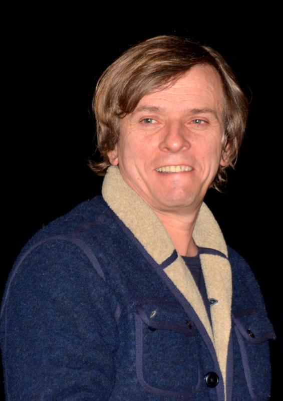 Pascal Demolon à l'avant-première du film "Discount"